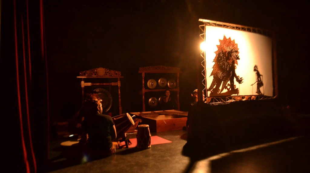 Gamelan Barudak Indra Swara en la Universidad Autónoma del Estado de México